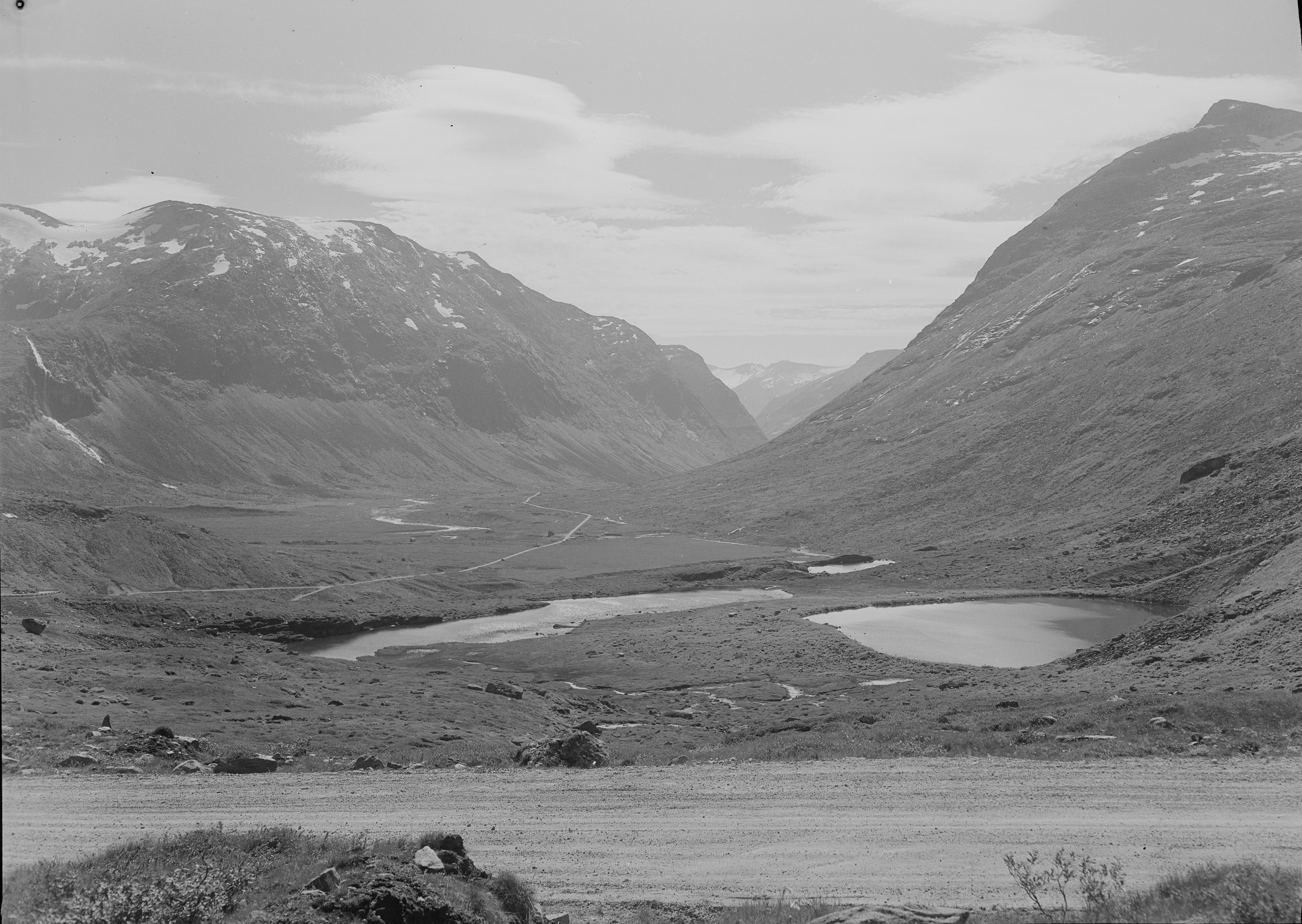 Bildet er hentet fra Nasjonalbibliotekets bildesamling. Anmerkninger til bildet var: Fotograf : ukjent Meiadalen,Slettvikane, Norddal, Møre og Romsdal